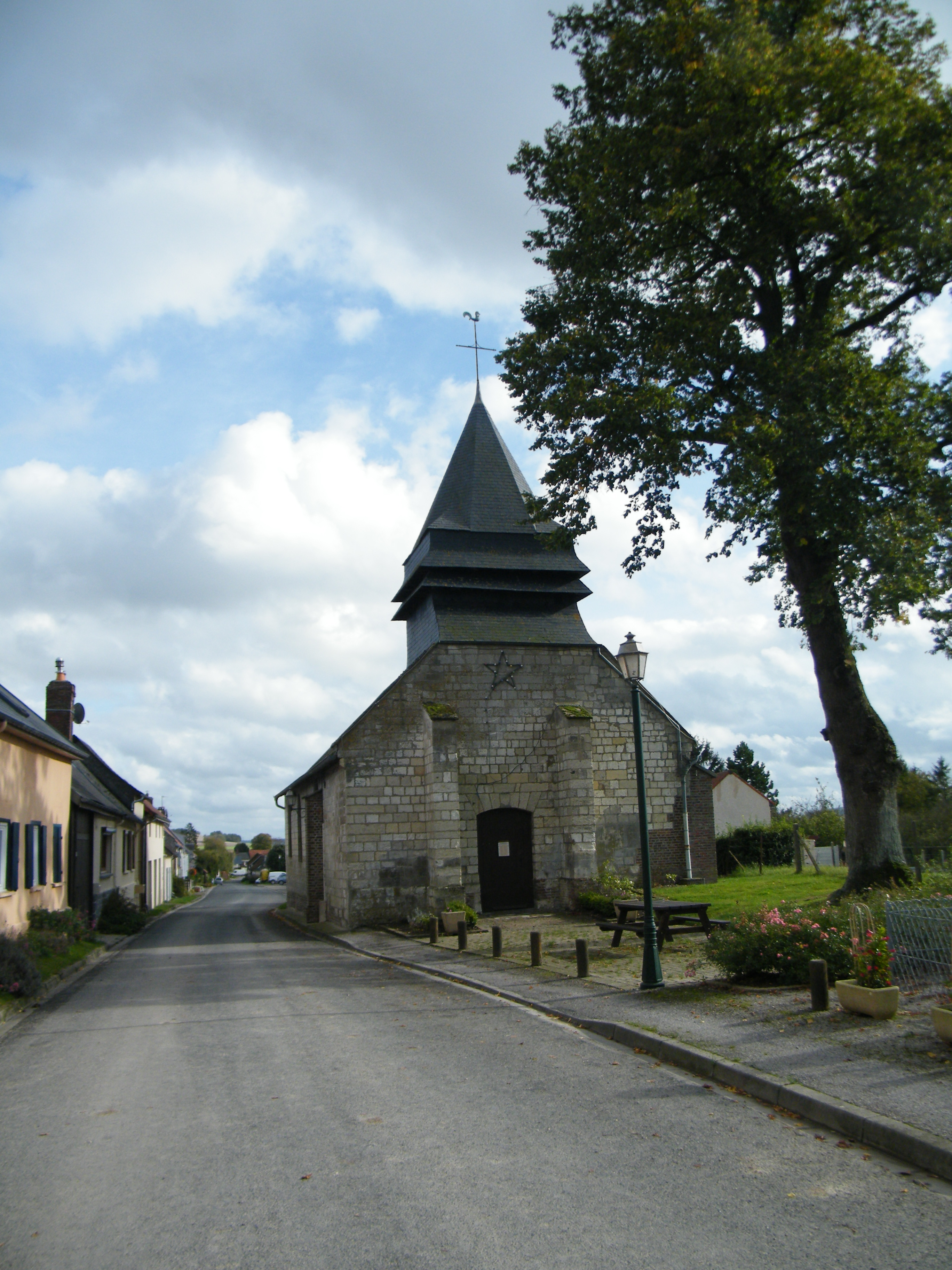 église.